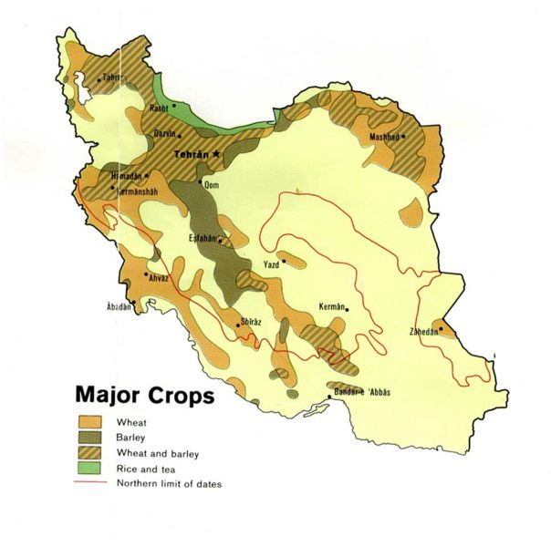 Iran Major crops, circ 1978.